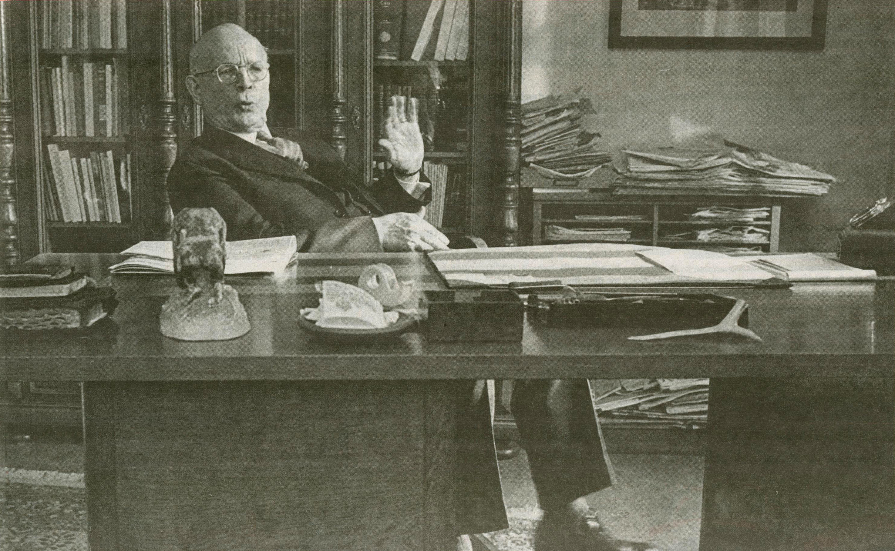 Lewi Pethrus.